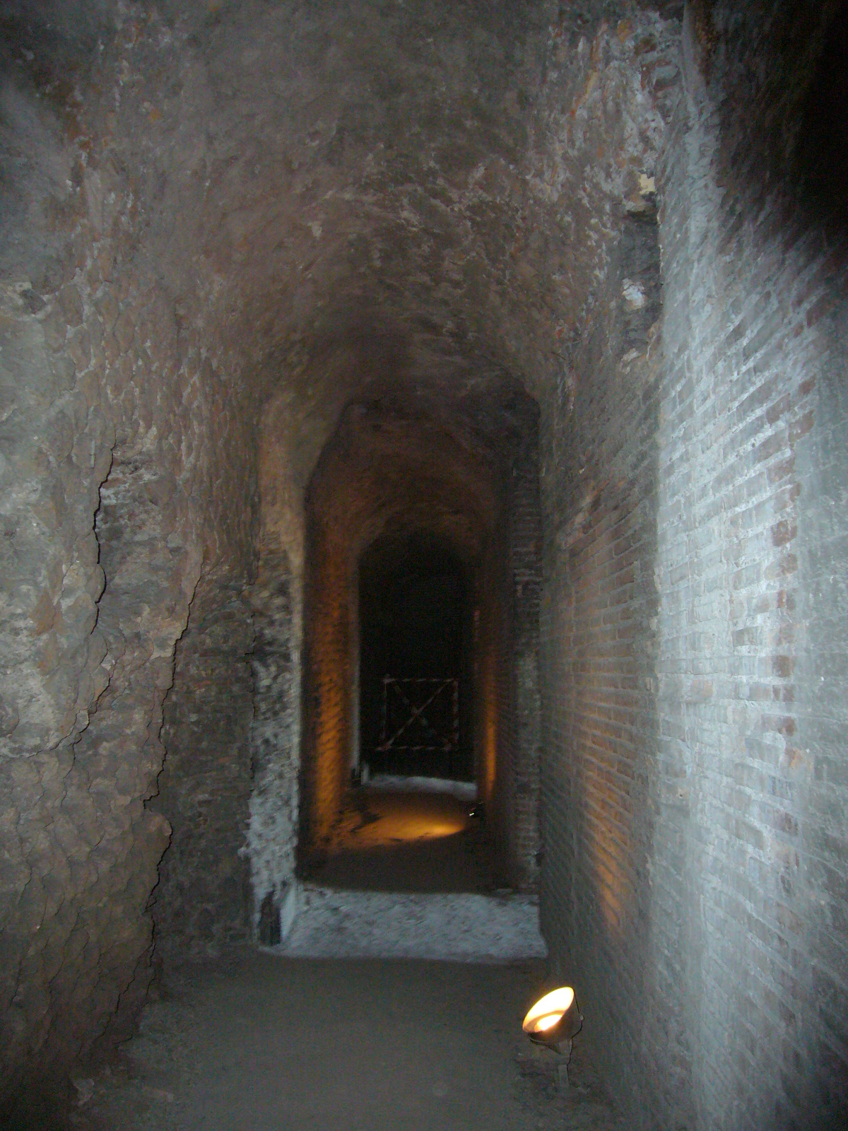 Roma, Insula dell'Ara Coeli: corridoio interno del 3^ piano